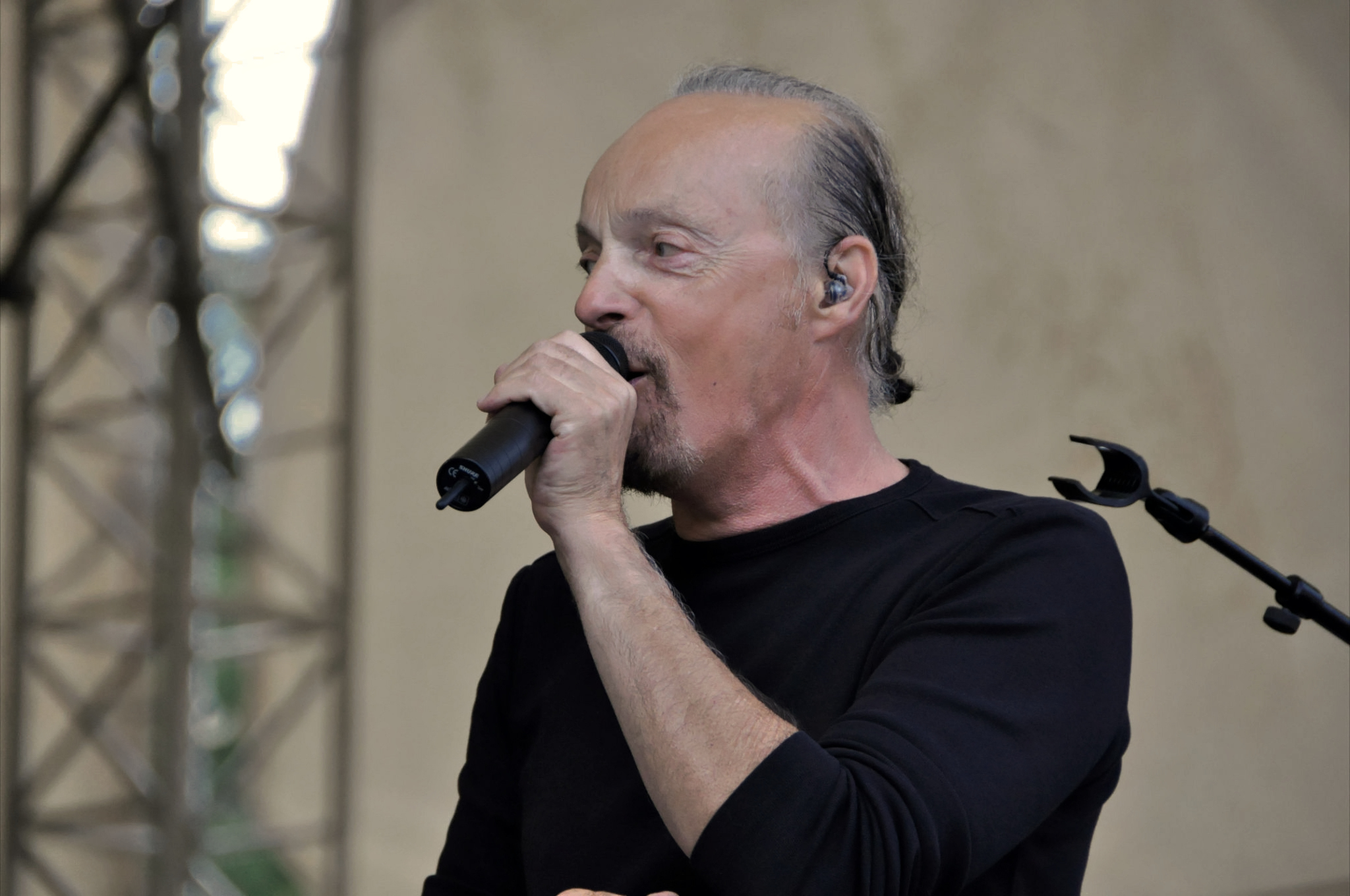 Alan Stivell en concert à Gourin lors du Championnat des sonneurs le 5 septembre 2010.